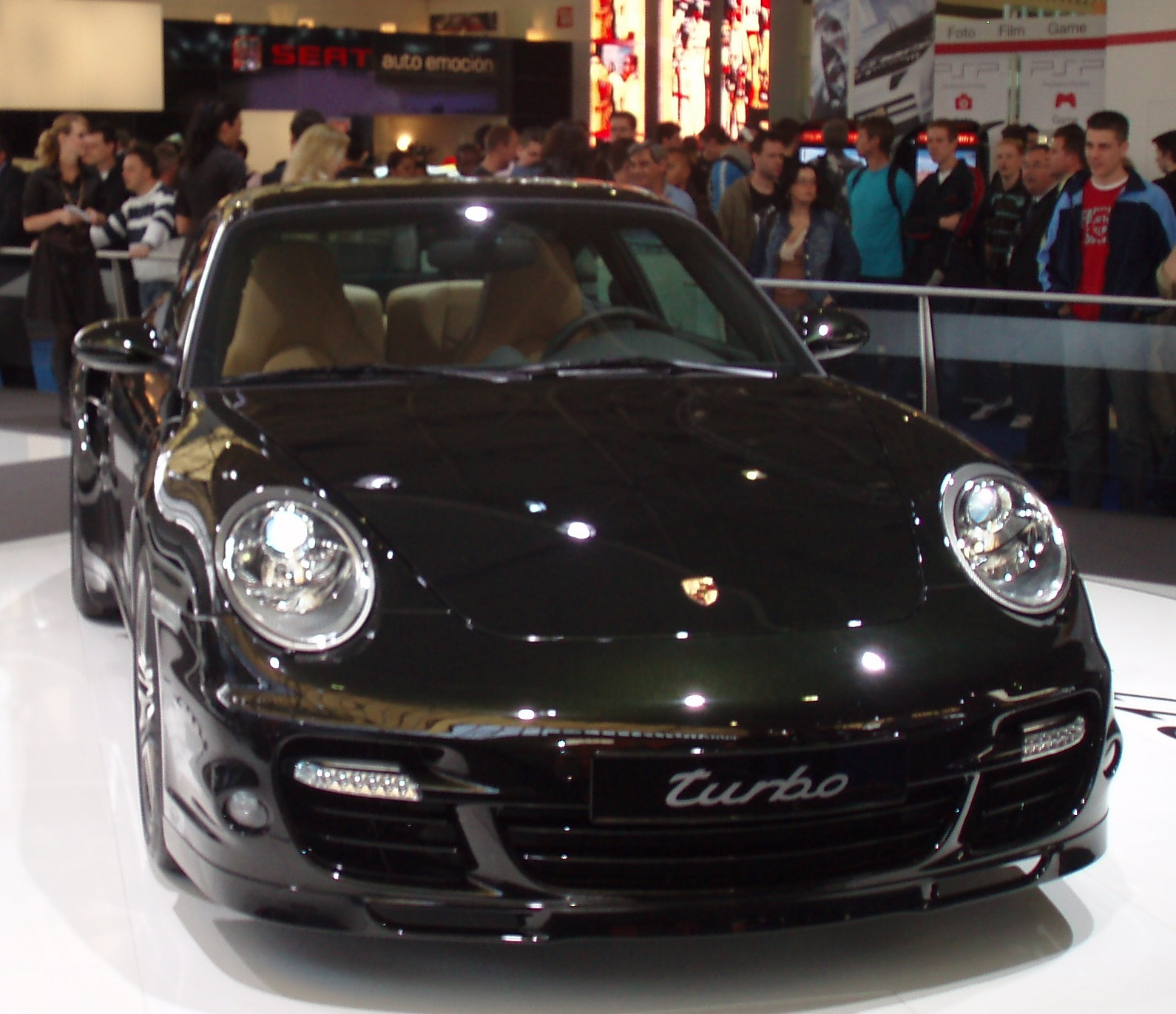 Porsche 997 turbo